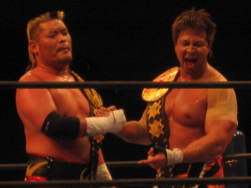 天コジ（天山広吉&小島聡、新日本プロレス、大阪大会2月12日）